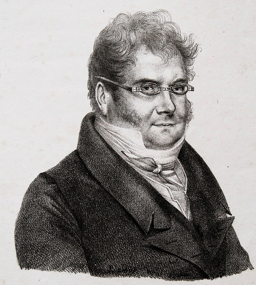 portrait dessiné de Pierre Adolphe Lesson